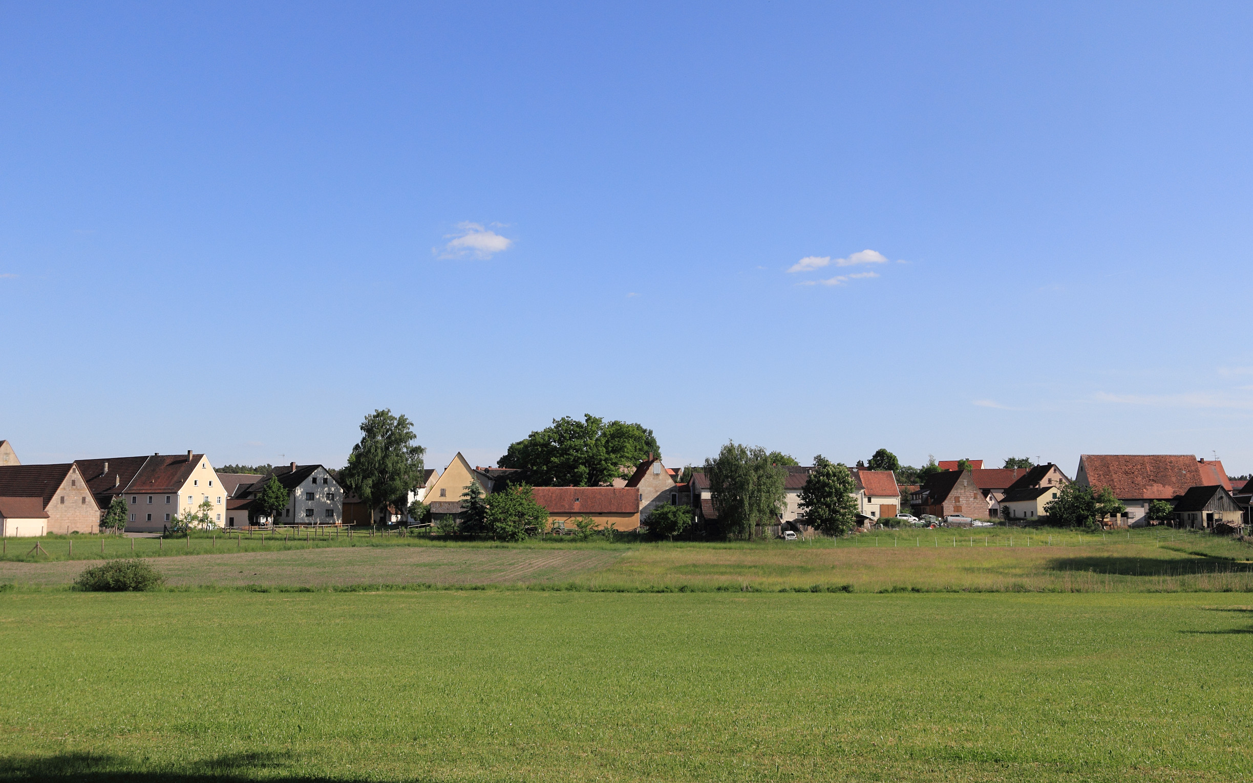 Stadt Abenberg, Ortsteil Dürrenmungenau - Dorfanger von Norden